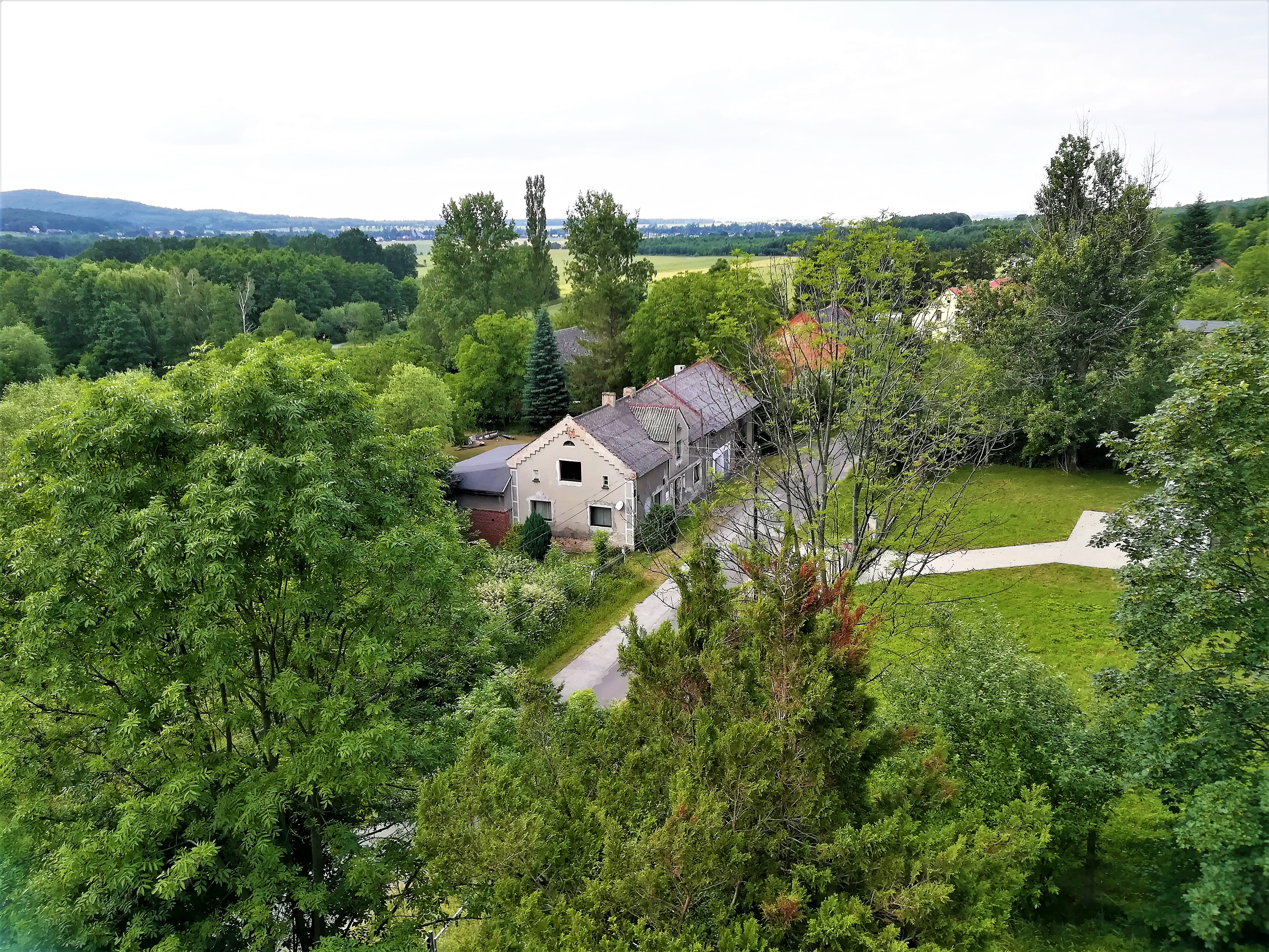 Wieża widokowa w Wieszczynie.